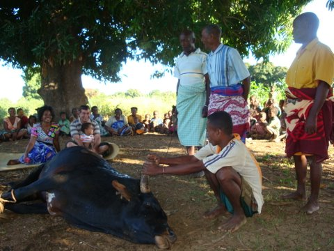 Le zébu est sacrifié pour presque chaque évènement traditionnel, ici pour la Reconnaissance de l'enfant